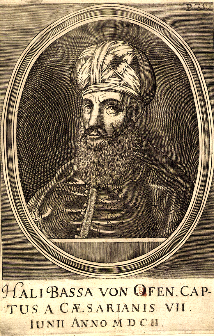 Kandizade Ali pasa, 1599. januárjában még mint nigeboli béget említik, 1602. júliusának végétől budai pasa. 1604. augisztusának első harmadában letették, később Szilisztra vezetője volt. 1605. októberének első harmadában ismét budai pasa volt, 1609. november 28. a szultán udvarába hívták. 1610. júniusának első harmadában vezírré emelték, s Murád pasa nagyvezír egyik leányát kapta meg feleségül. Később ruméliai, bagdadi, dijárbekri pasa volt, letétele után a vizei szandzsákot vezette.